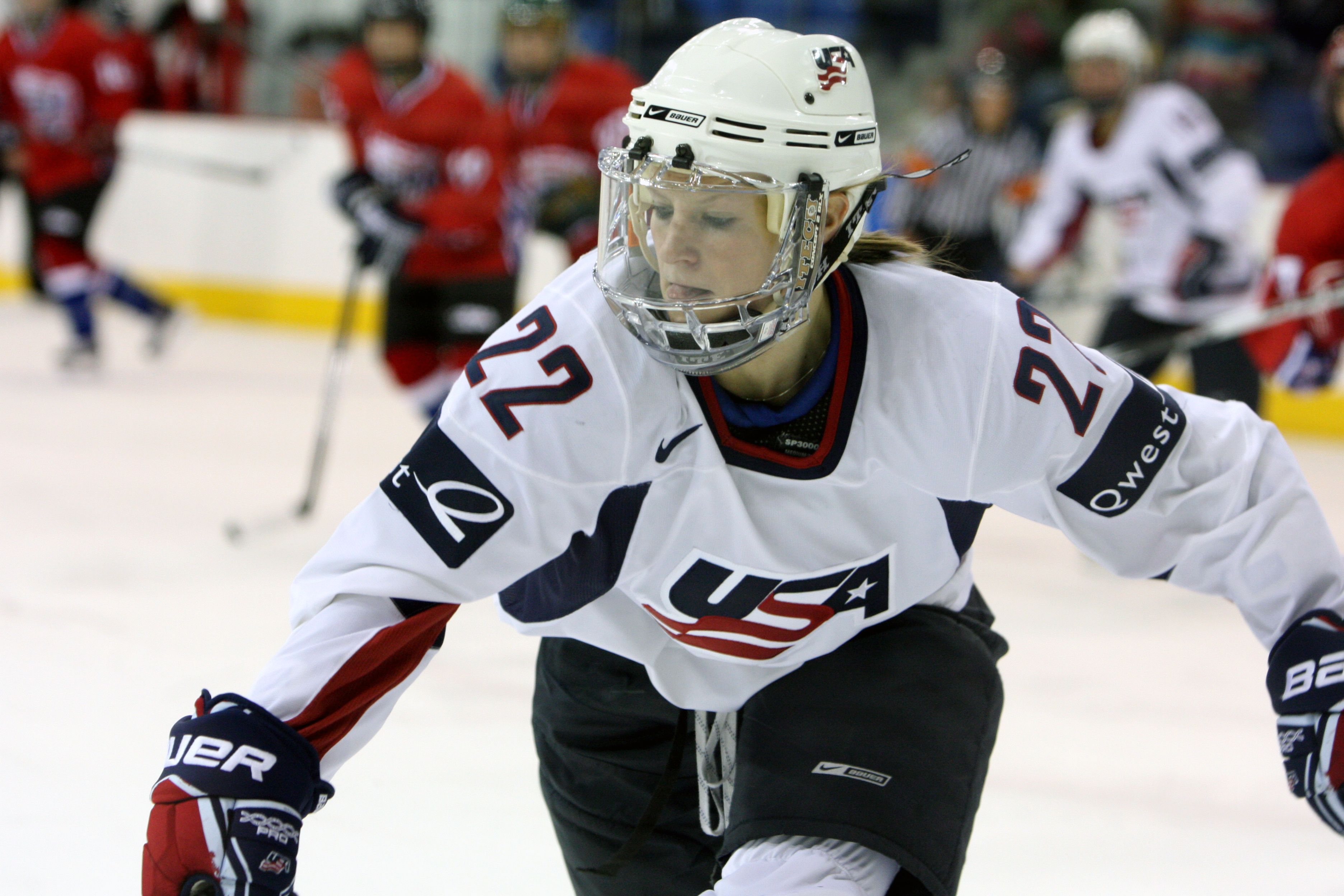 22 Kacey Bellamy17